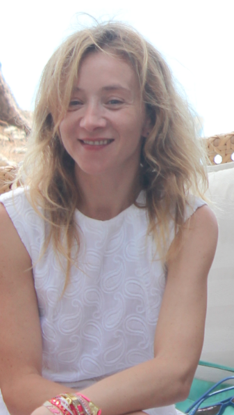 Sylvie Testud, lors du Festival du film de La Réunion, le 12 novembre 2013.